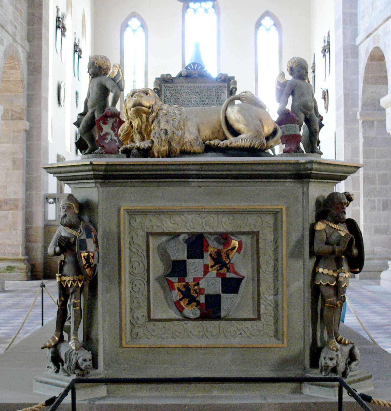 Heilsbronn, Münster St. Marien und Jakobus Grabmal des Markgrafen Georg Friedrich I. (des Älteren), † 1603